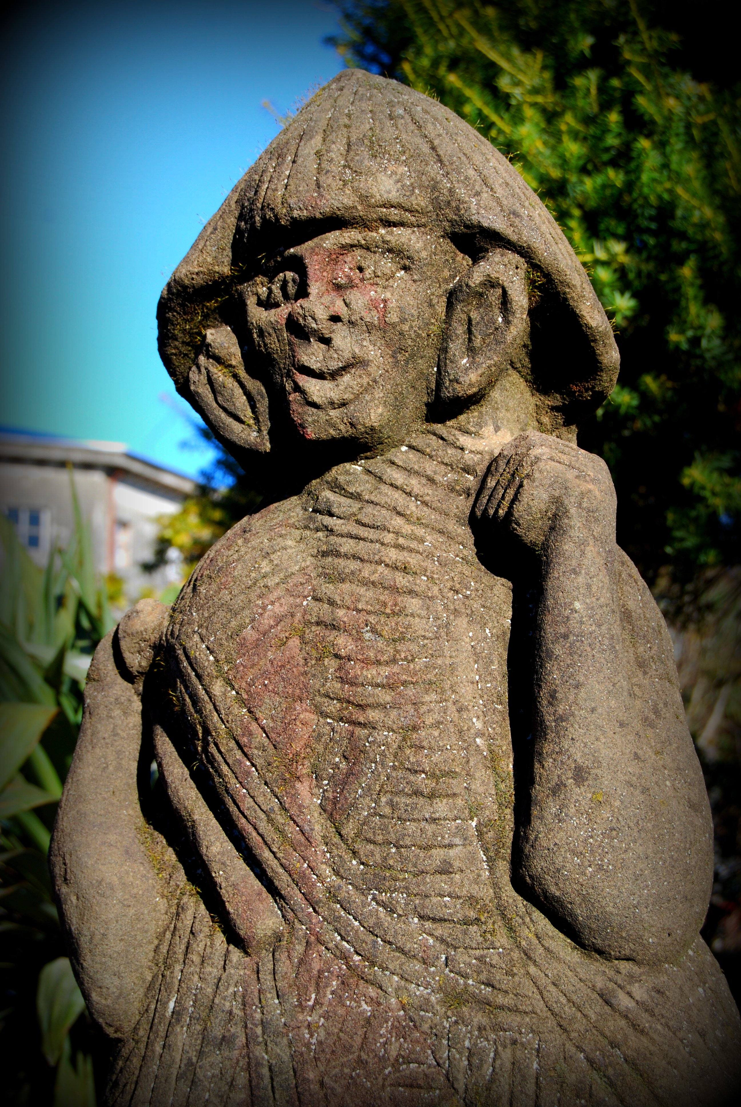 Estatua del Trauco, en la plaza de Armas de Ancud.